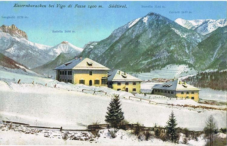 Sommerkaserne der k.k. Landesschützen in Vigo di Fassa/Moena